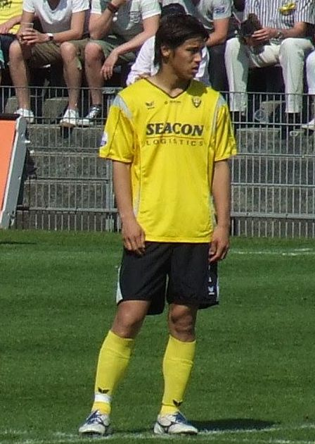 Keisuke Honda, VVV Venlo